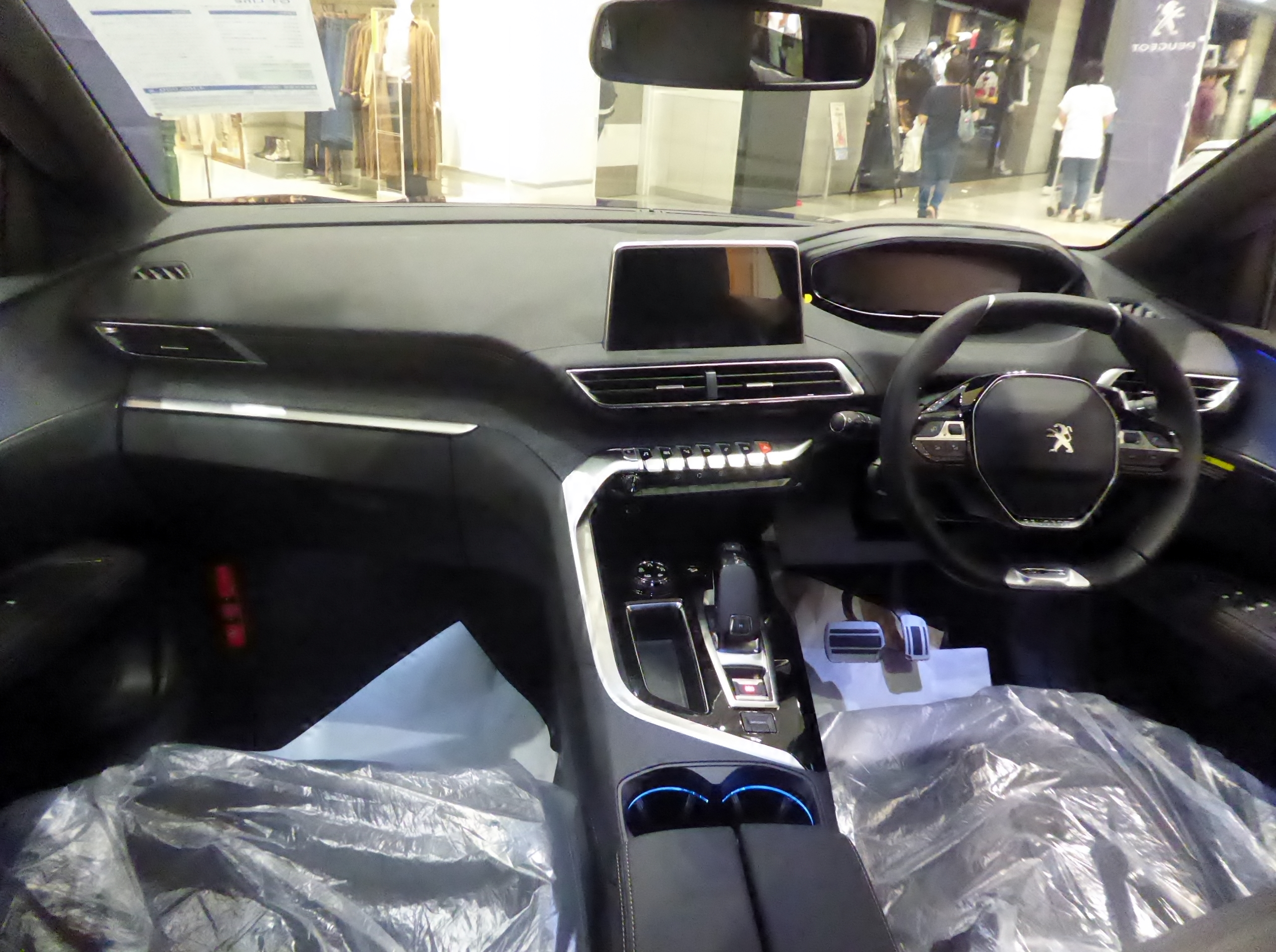 3BA-P845G06型プジョー・3008 GT Lineのインテリアを撮影。